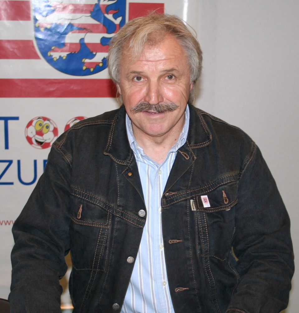 Dragoslav Stepanovic auf der Frankfurter Buchmesse 2005